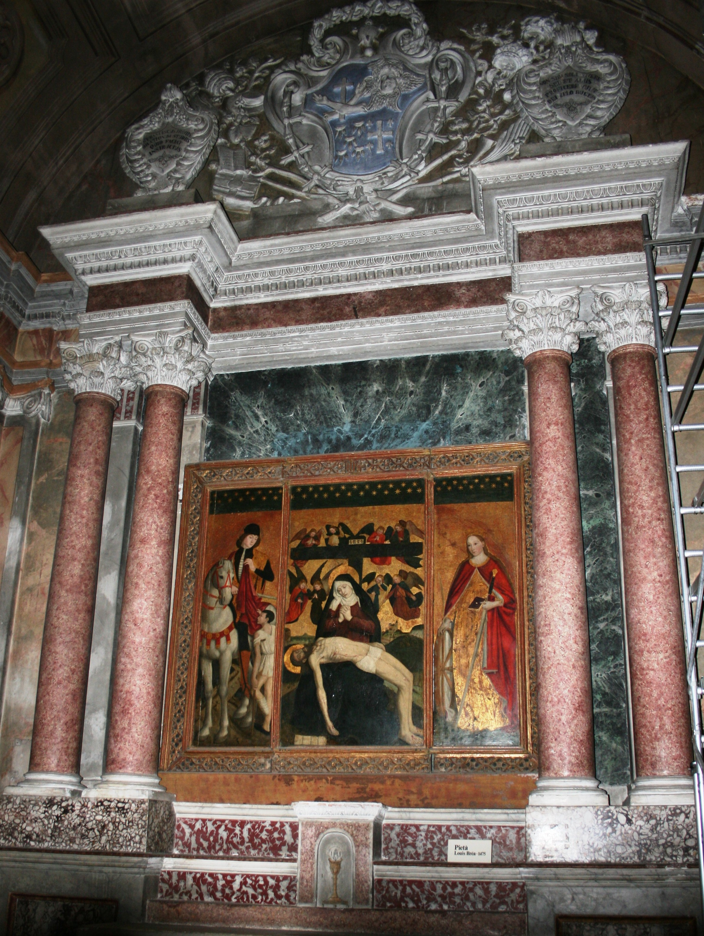 in Monastère des Franciscains, Nice (France), quartier de Cimiez. Première œuvre attestée de Louis Brea